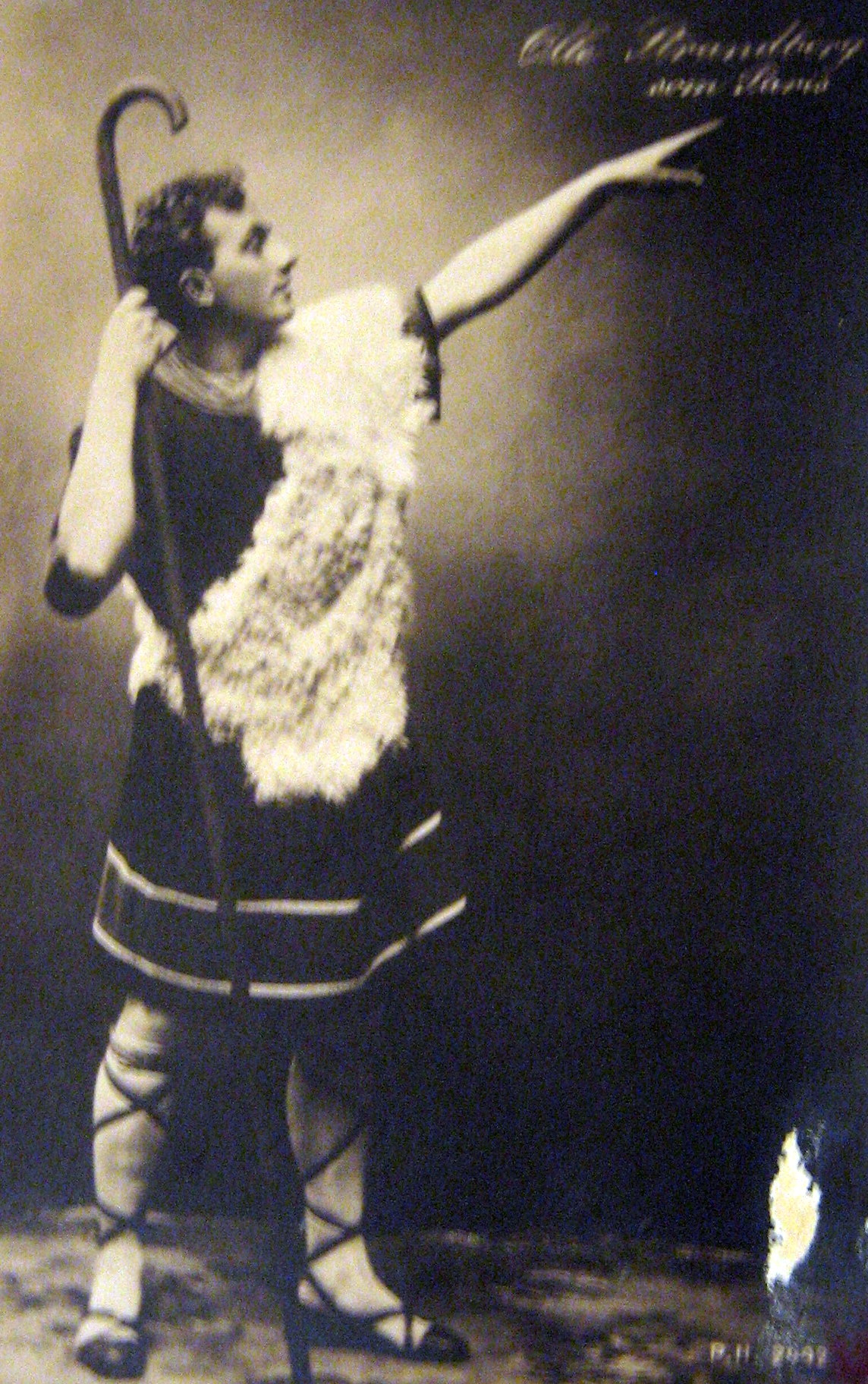 Olle Strandberg som Paris i "Sköna Helena", ca 1910.